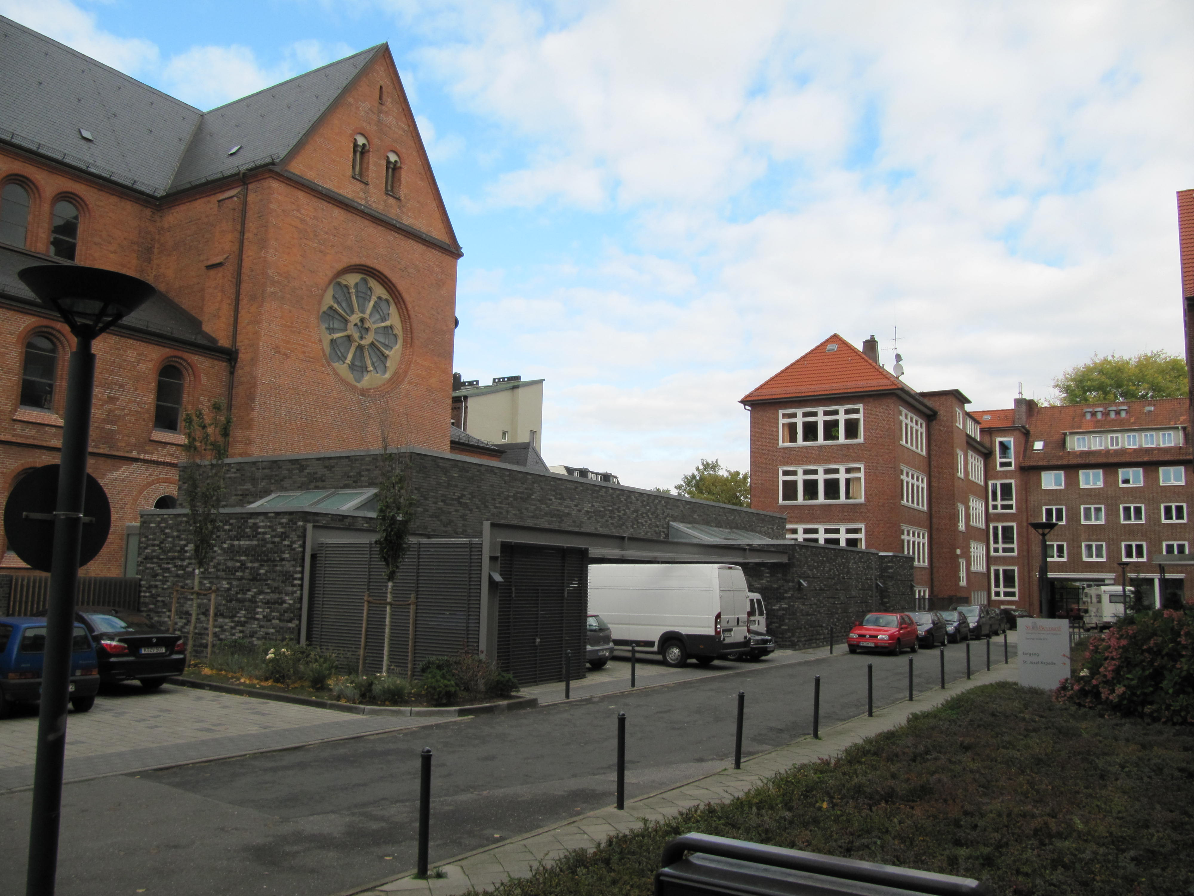 Domschule